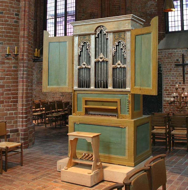 Italienische Orgel der Ev.-luth. Marktkirche Hannover 1780 erbaut von Cimino